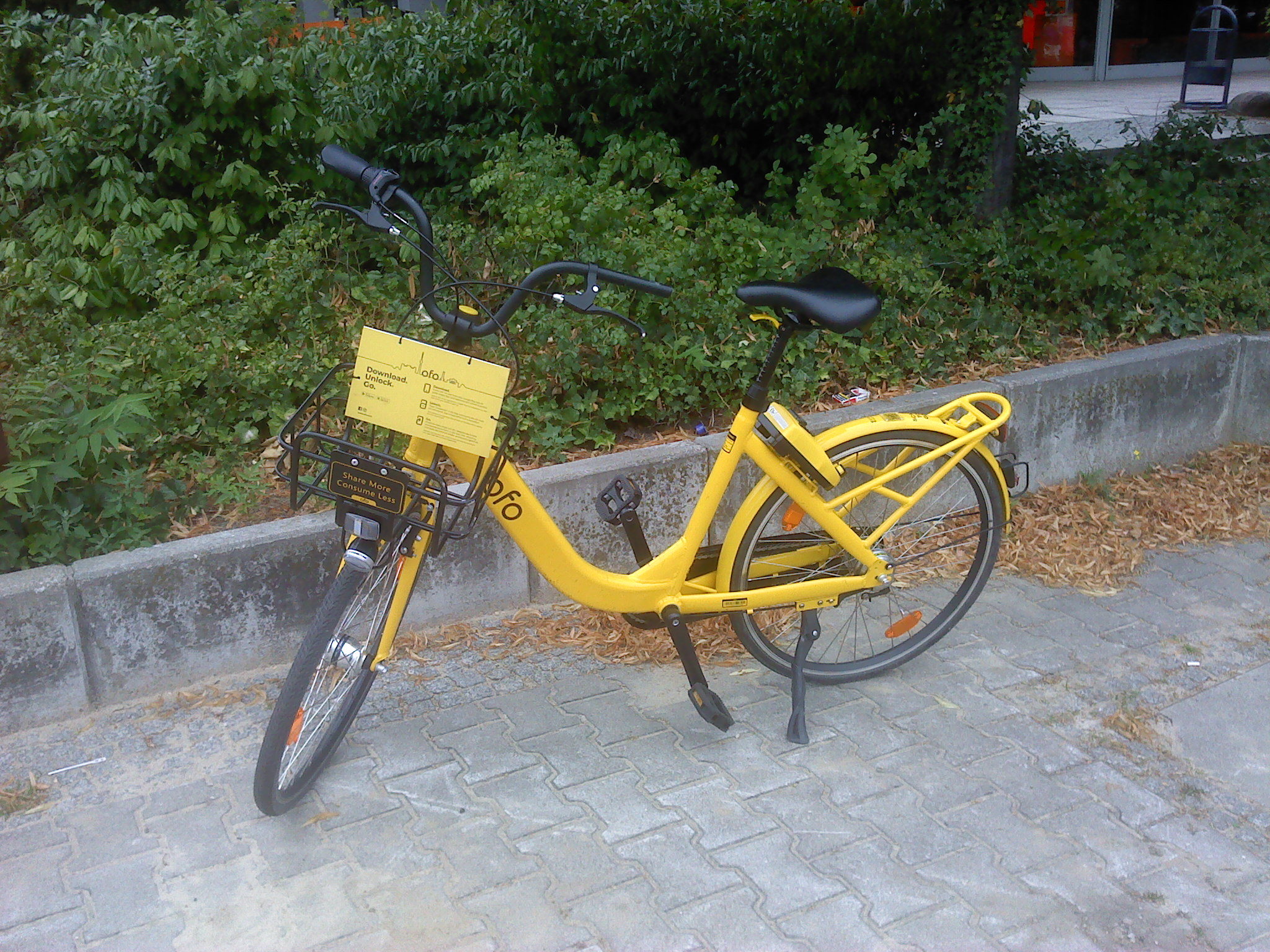 Leihfahrrad OFO in Berlin